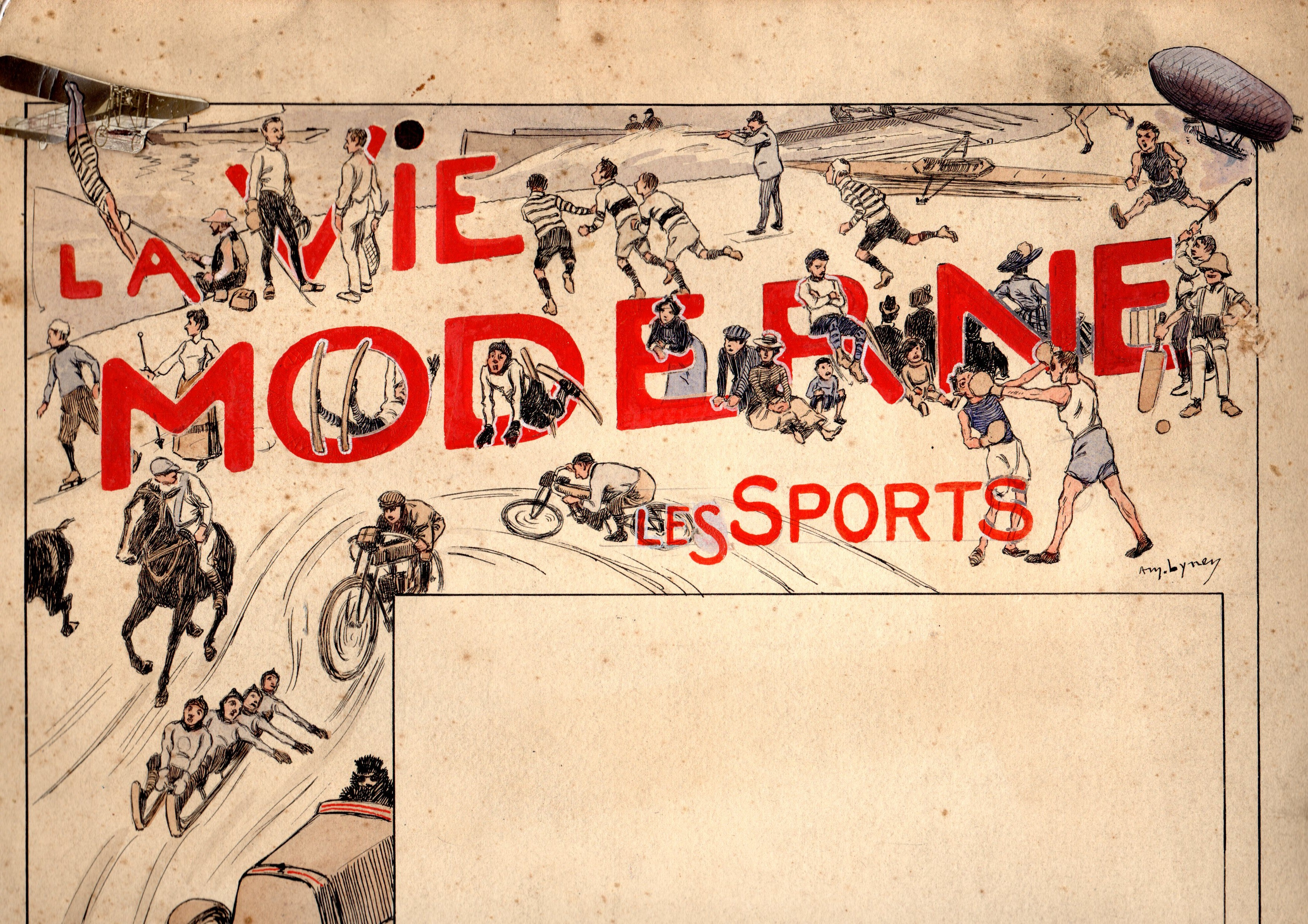 Dessin d'Amédée Lynen (1852-1938), La Vie moderne Les Sports. Projet de Revue.